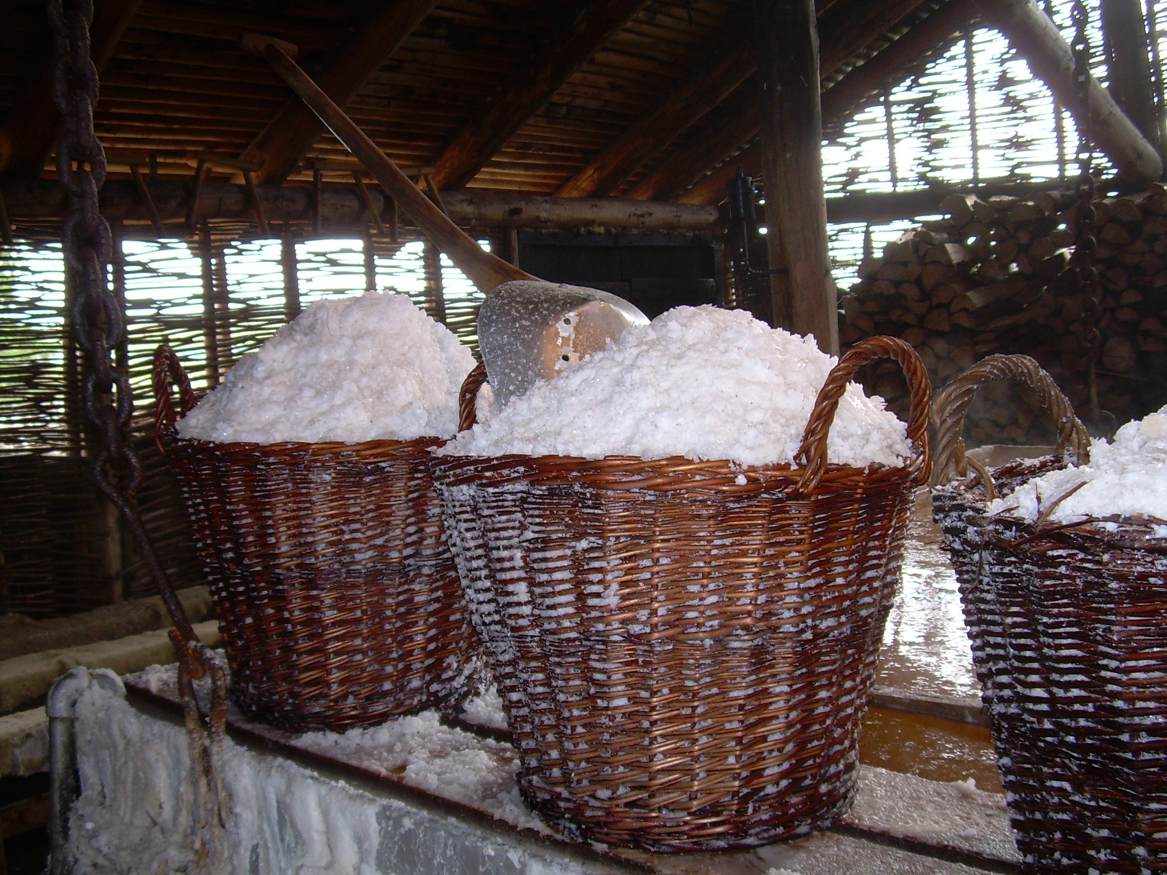 Salt from Læsø, Denmark